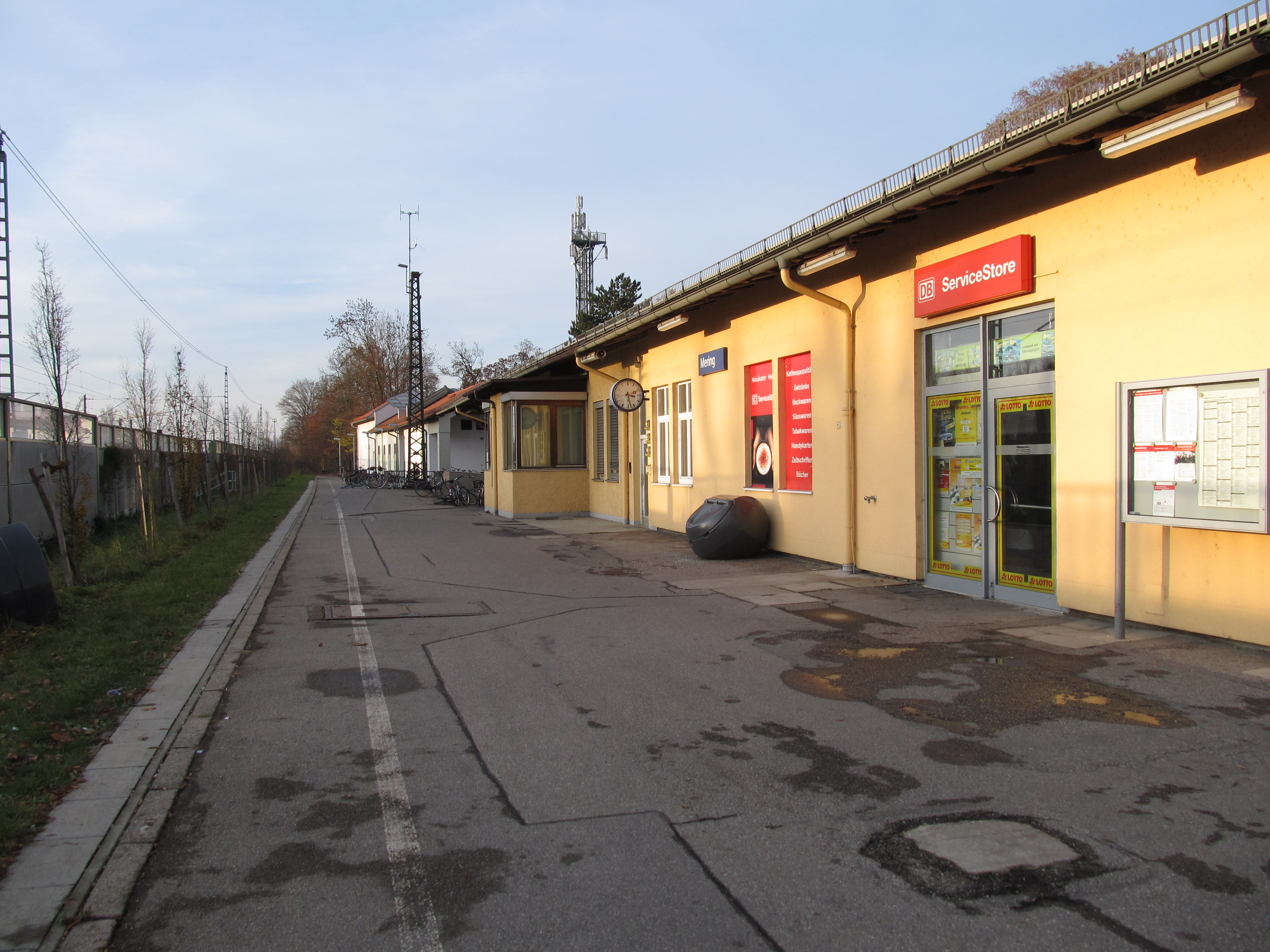 Bahnhofsgebäude von Mering von der Bahnsteigseite